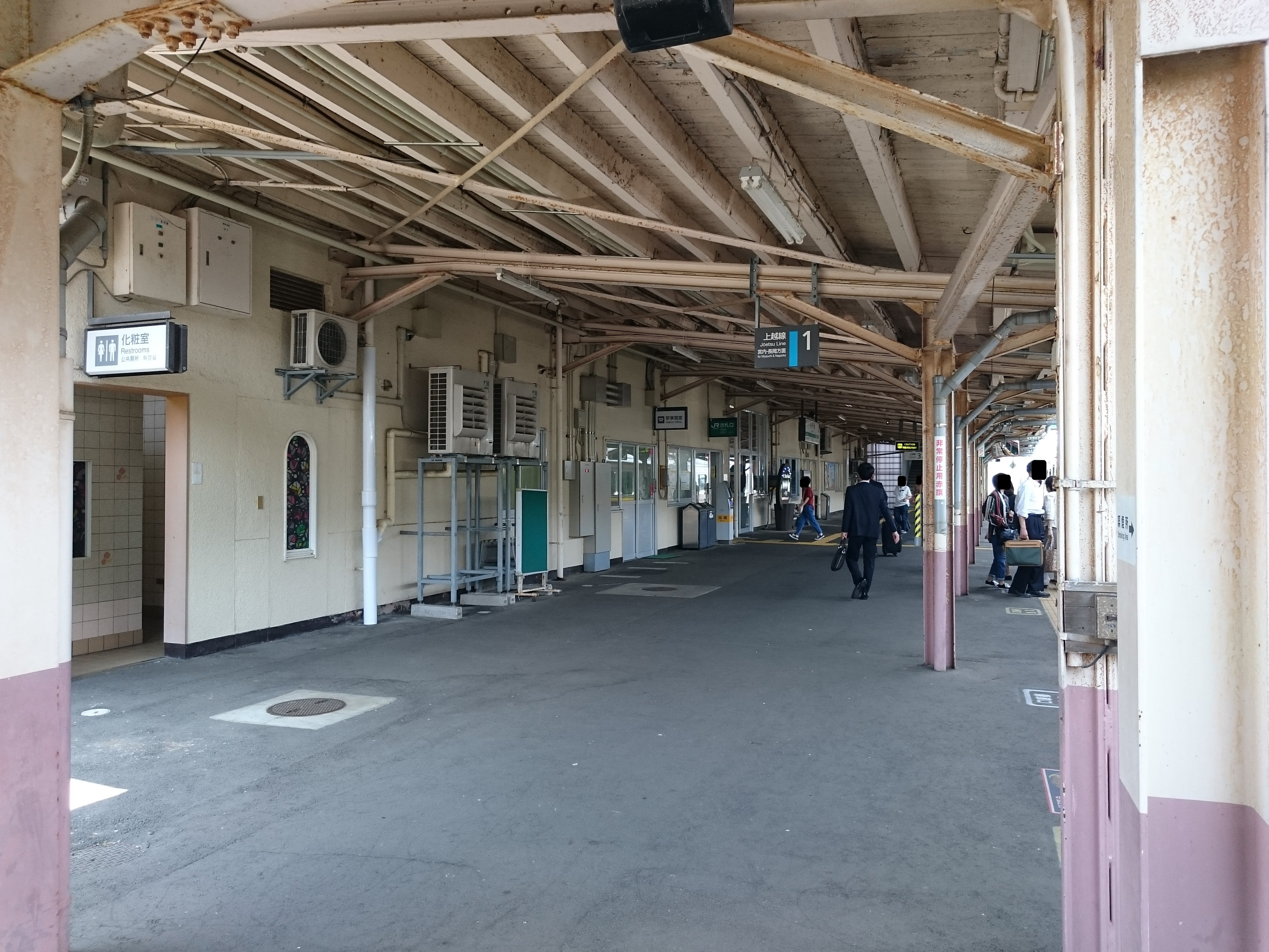 小千谷駅の1番線ホーム